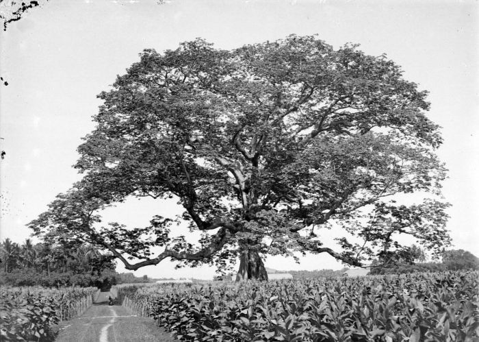 Repronegatief. Bombax malabaricum = Bombax ceiba, reuzenboom